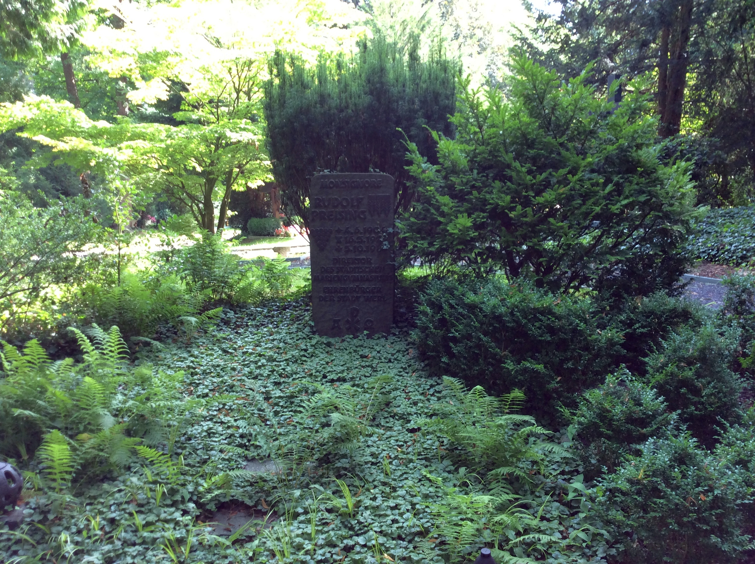 Grabstätte für Rudolf Preising, Direktor des Mariengymnasiums in Werl, päpstlicher Geheimkämmerer und Autor